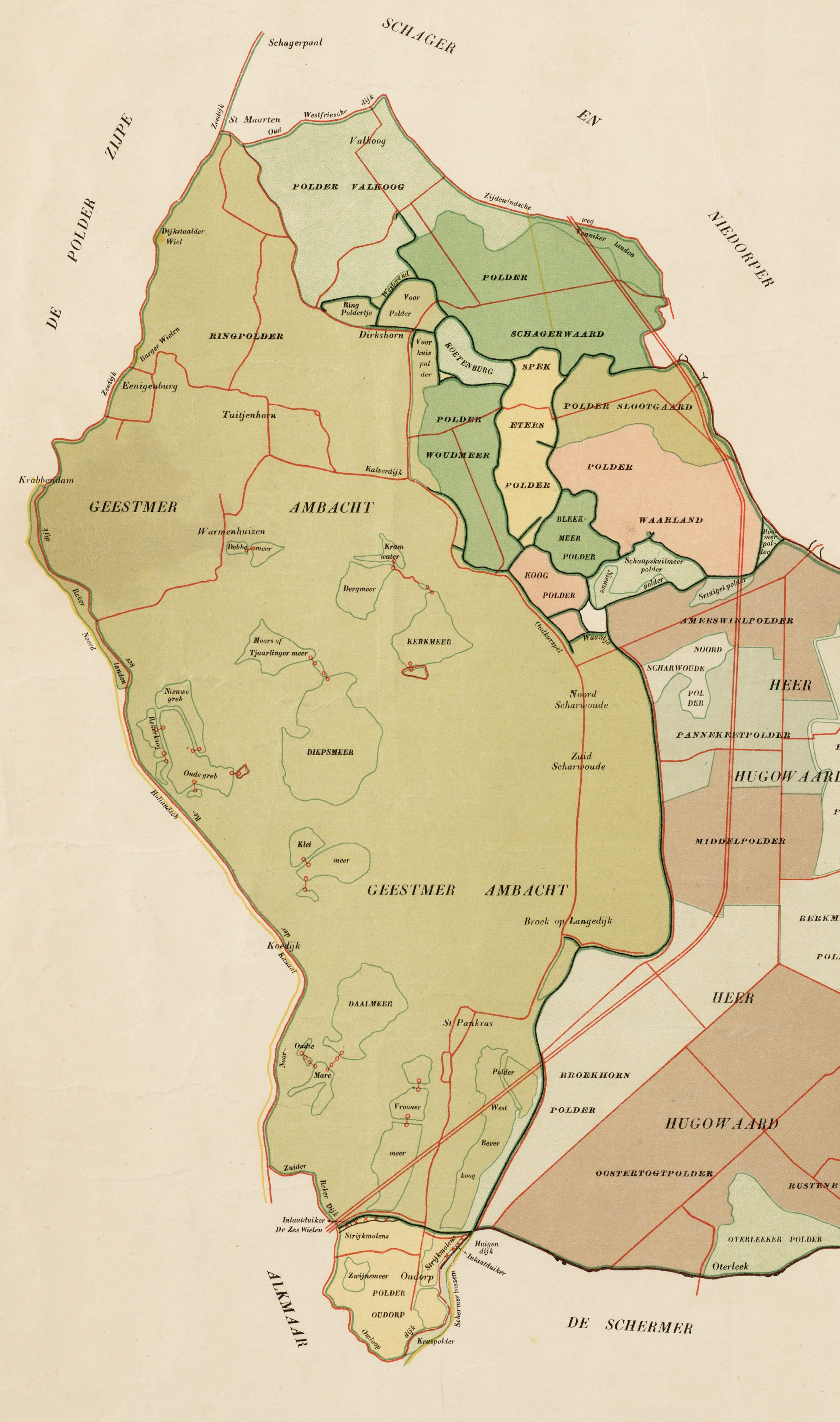 Polderkaart van het Geestmerambacht met lijsten van polders en bemalingswerktuigen en verklarende tekst over de bemaling